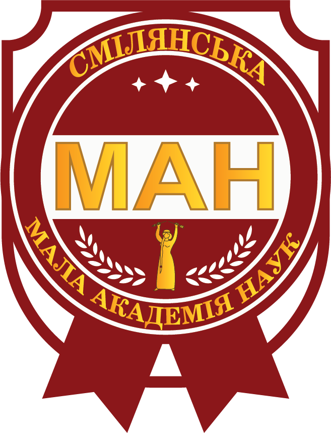 Логотип Смілянського ТВМАНУ